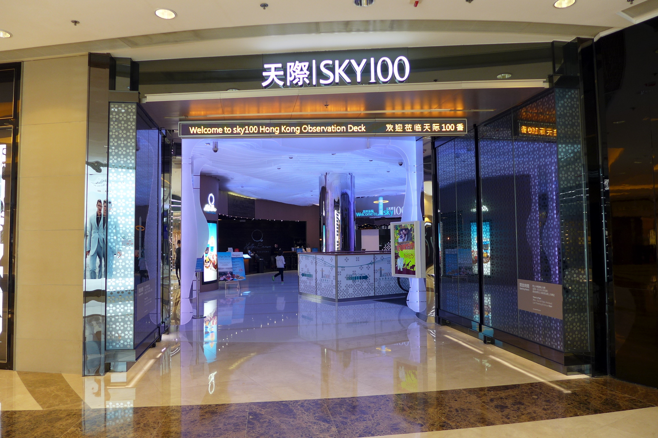 SKY 100 Entrance